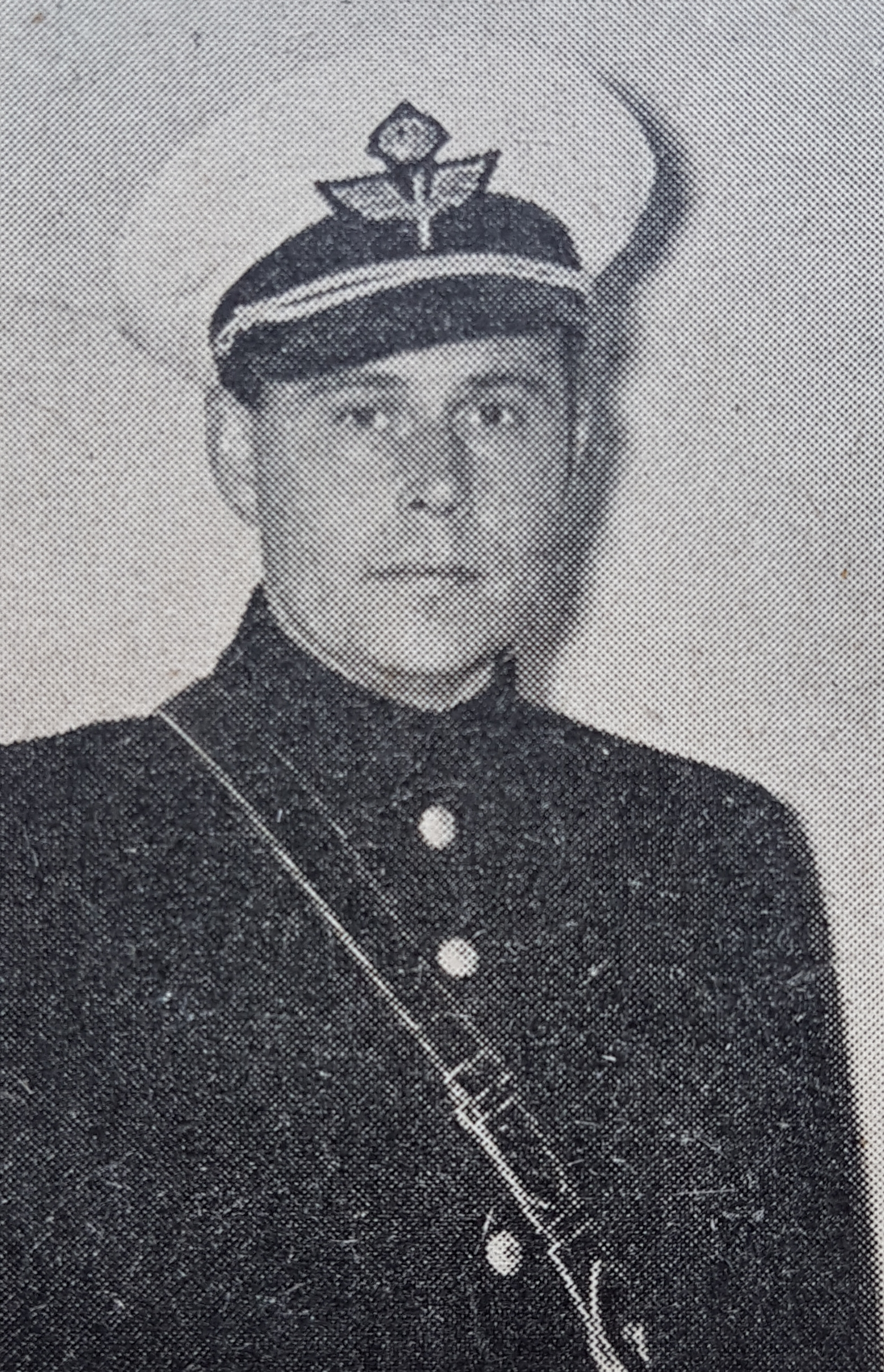 Alvar Zacke